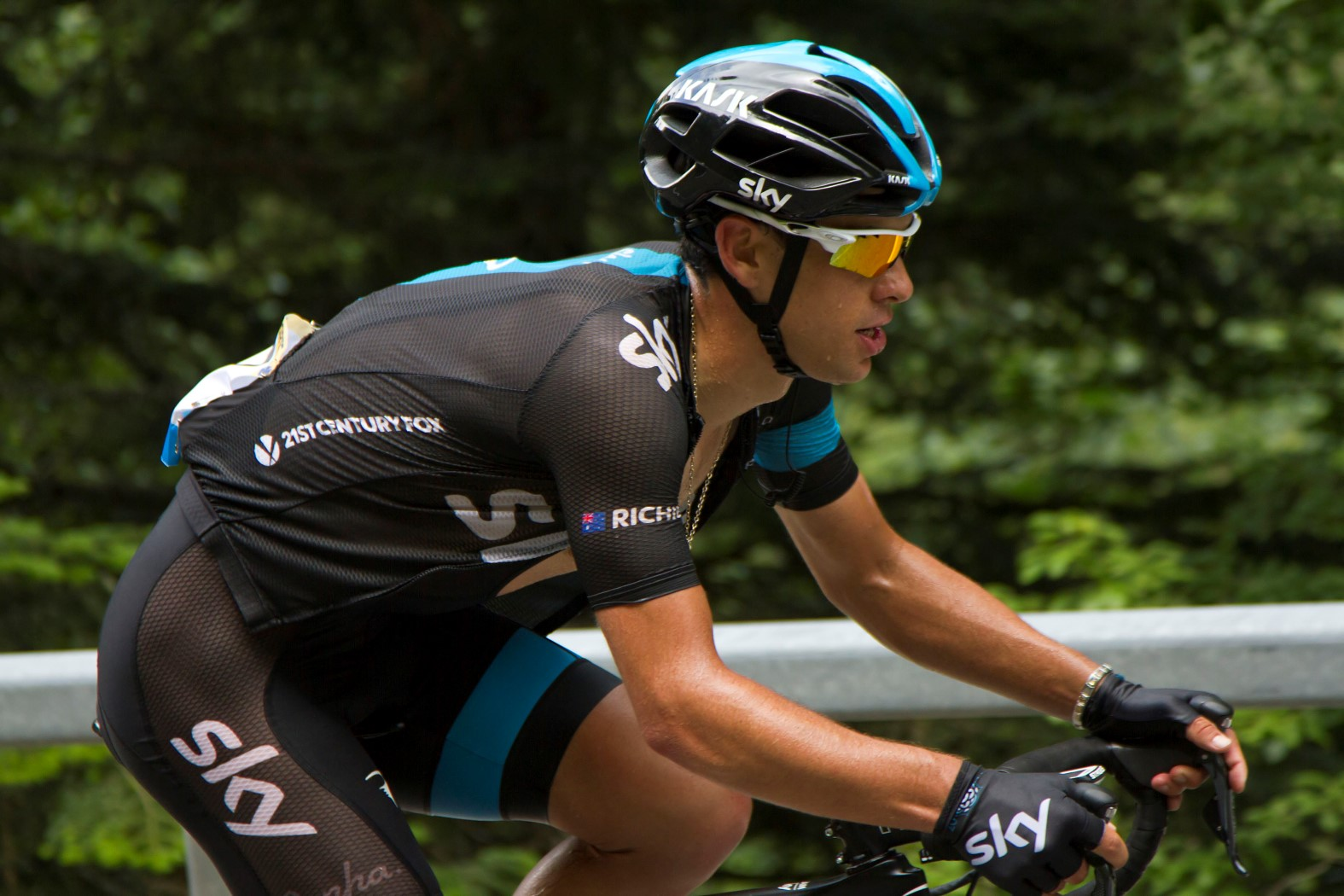 356 richie porte